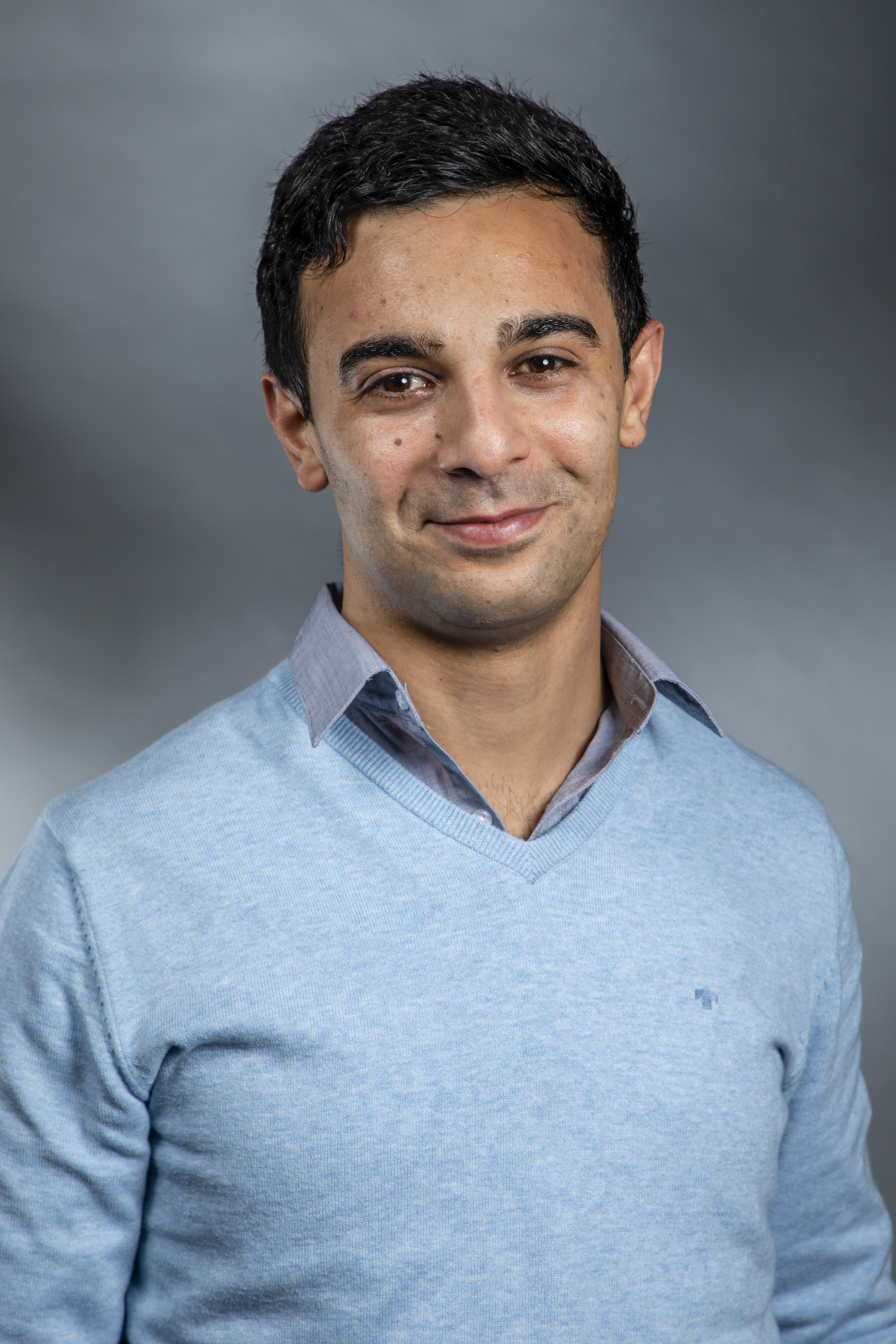 Mazlum Koc